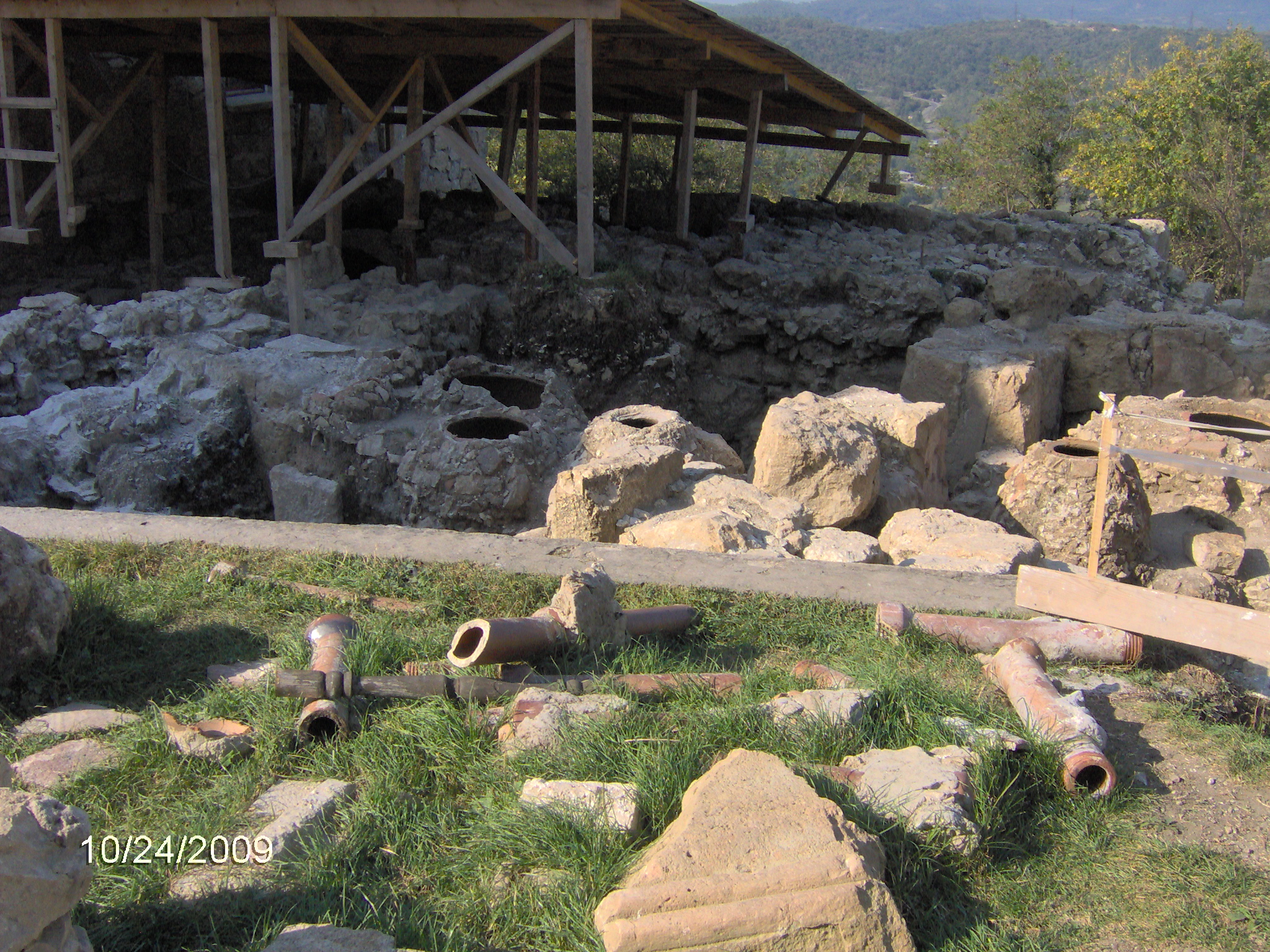 ძველი მარანი გელათის მონასტერში